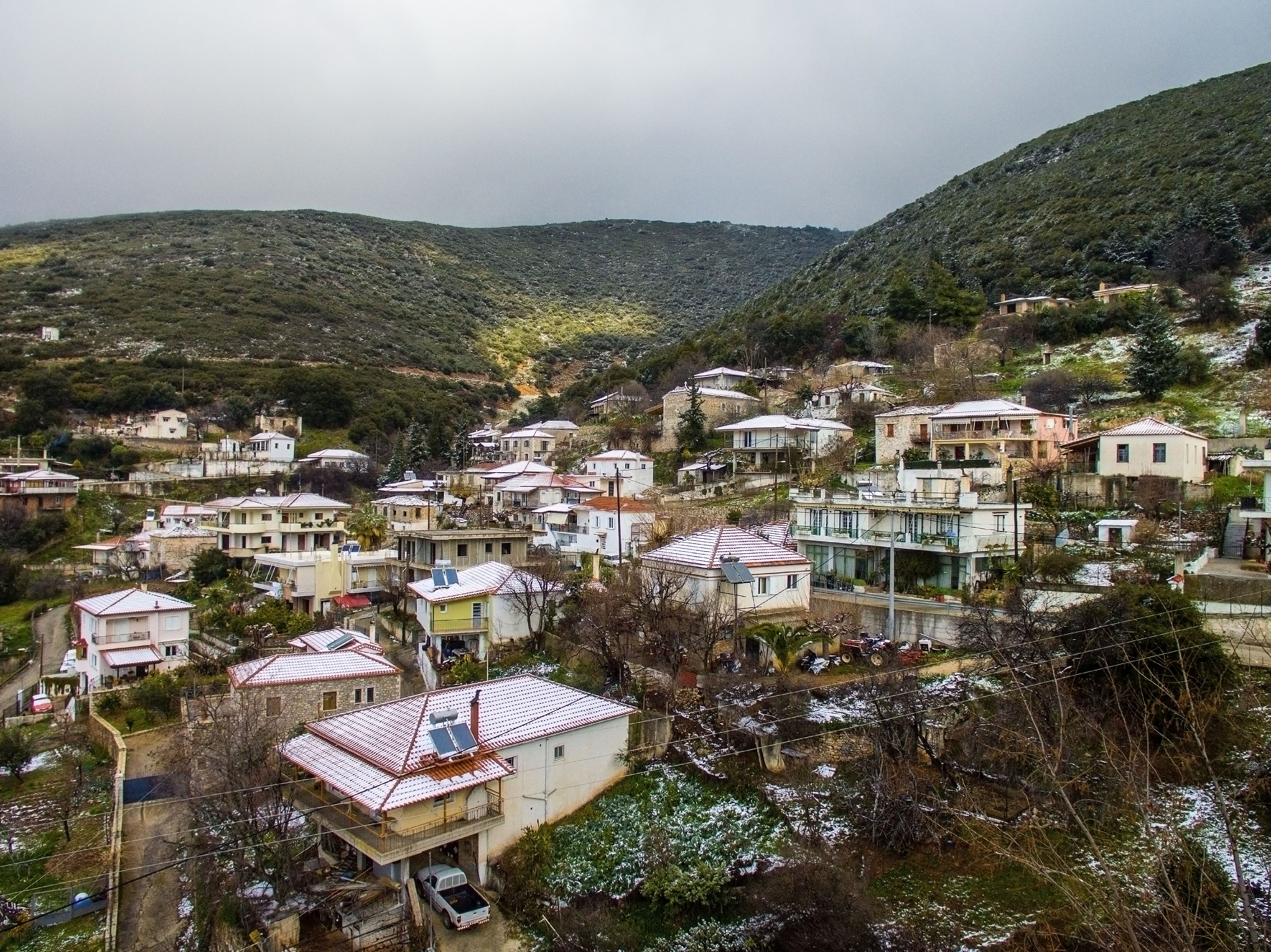 Το χωριό μας